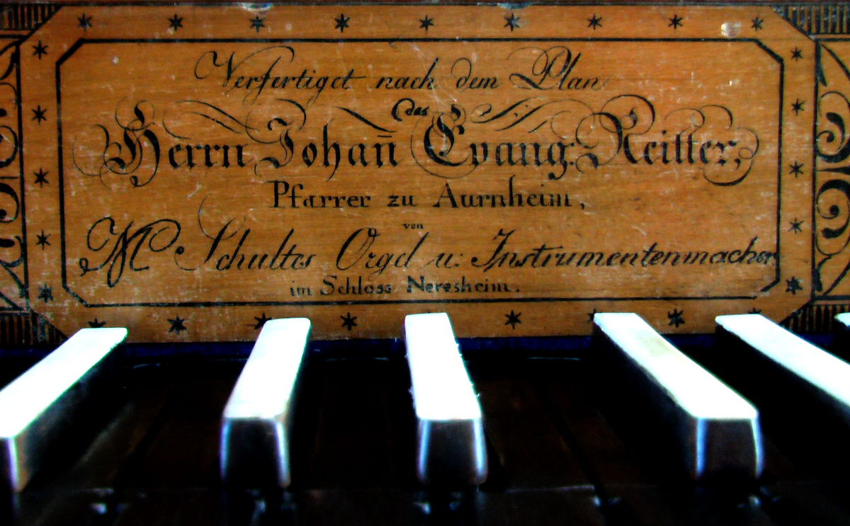 Orgel der Auernheimer St. Georgskirche – Inschrift über Manual: "Verfertiget nach dem Plan des Herrn Johann Evang. Reitter, Pfarrer in Aurnheim, von M. (oder V. M.?) Schultes Orgel- u. Instrumentenmacher im Schloß Neresheim."